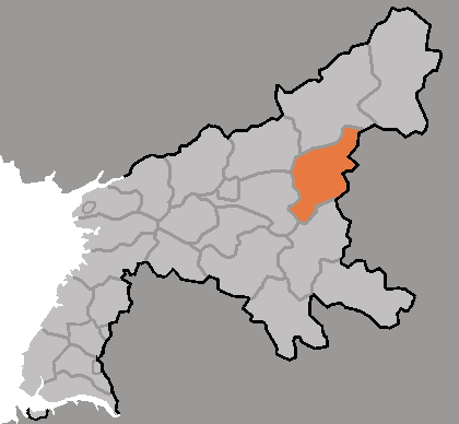 Map of Chongjin, Maengsan-namdo, DPRK, 2006